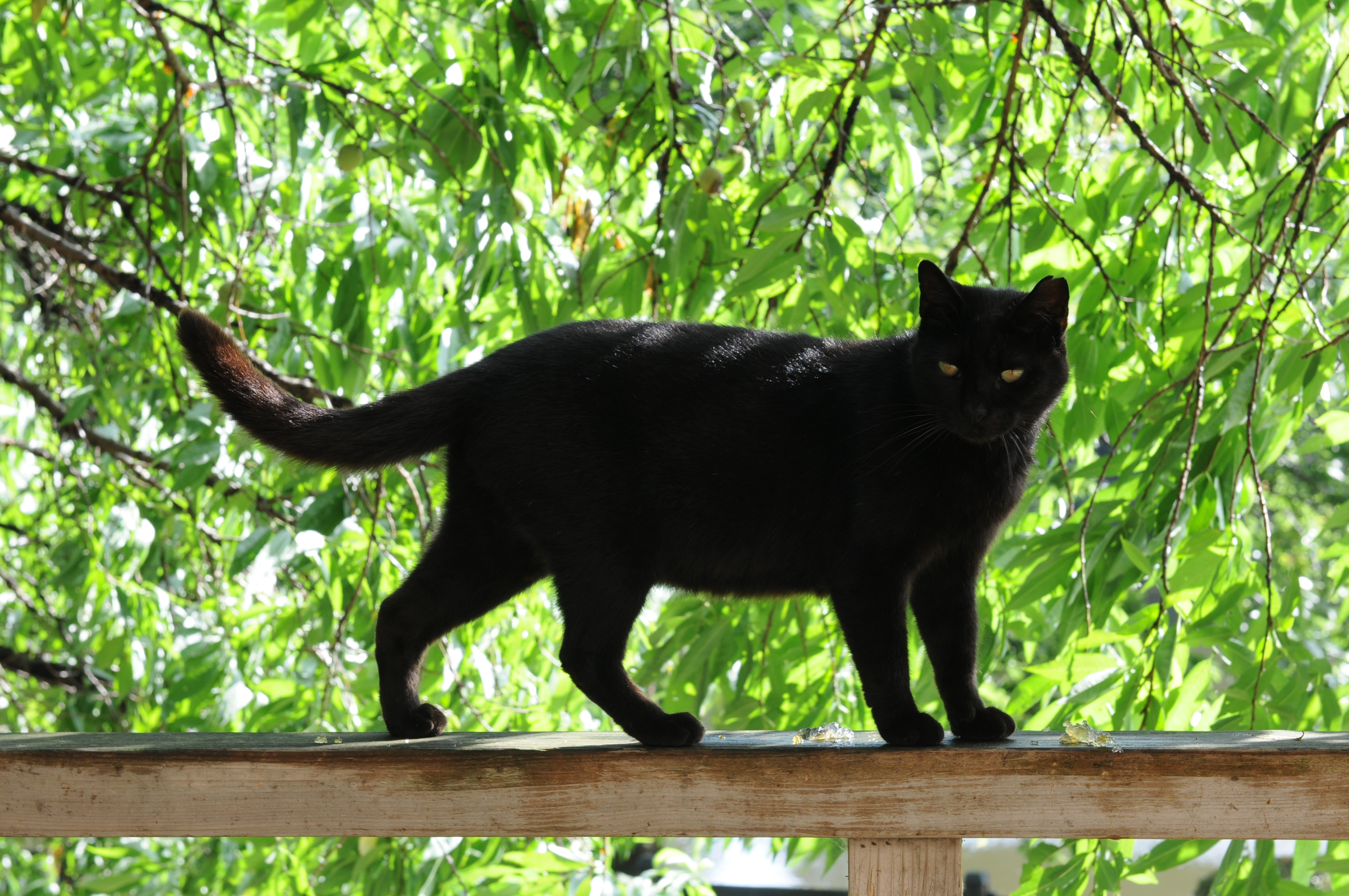 D06_0409